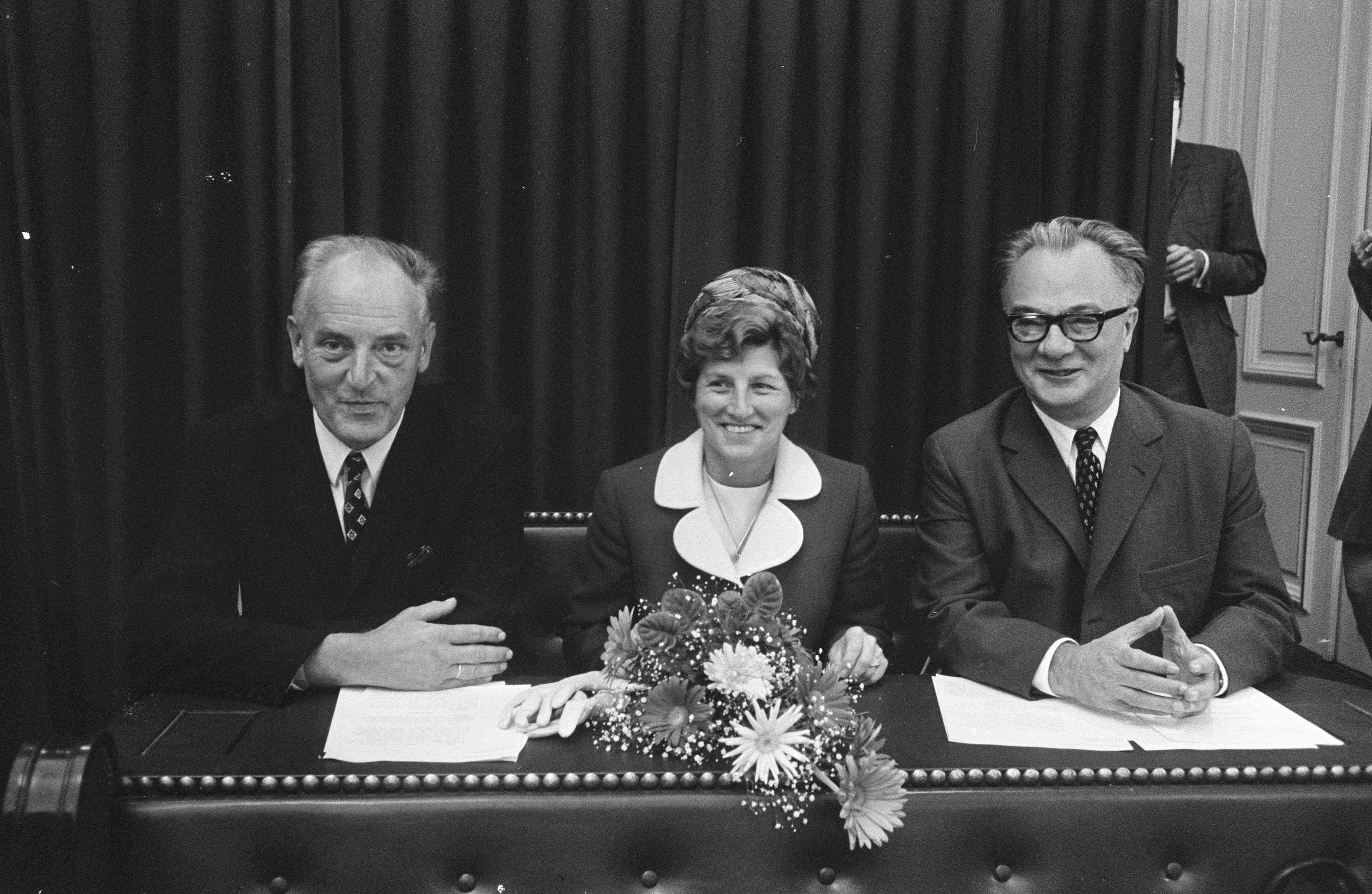 Collectie / Archief : Fotocollectie Anefo Reportage / Serie : [ onbekend ] Beschrijving : Mw. Van Veenendaal komt voor DS'70 in de Tweede Kamer; Groep-Goedhart v.l.n.r. J.W. Schuitemaker, S. van Veenendaal en F. Goedhart Datum : 28 juli 1970 Locatie : Den Haag, Zuid-Holland Trefwoorden : parlementariërs, persconferenties, politiek Persoonsnaam : Goedhart, F.J., Schuitemaker, Wijbrand, Veenendaal-van Meggelen, S. van Fotograaf : Koch, Eric / Anefo Auteursrechthebbende : Nationaal Archief Materiaalsoort : Negatief (zwart/wit) Nummer archiefinventaris : bekijk toegang 2.24.01.05 Bestanddeelnummer : 923-7065